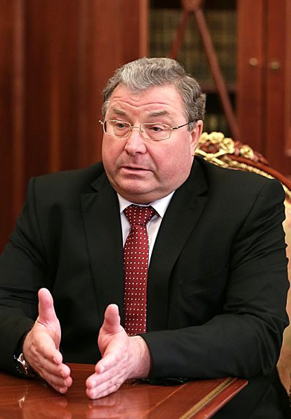 Глава Республики Мордовия Владимир Дмитриевич Волков